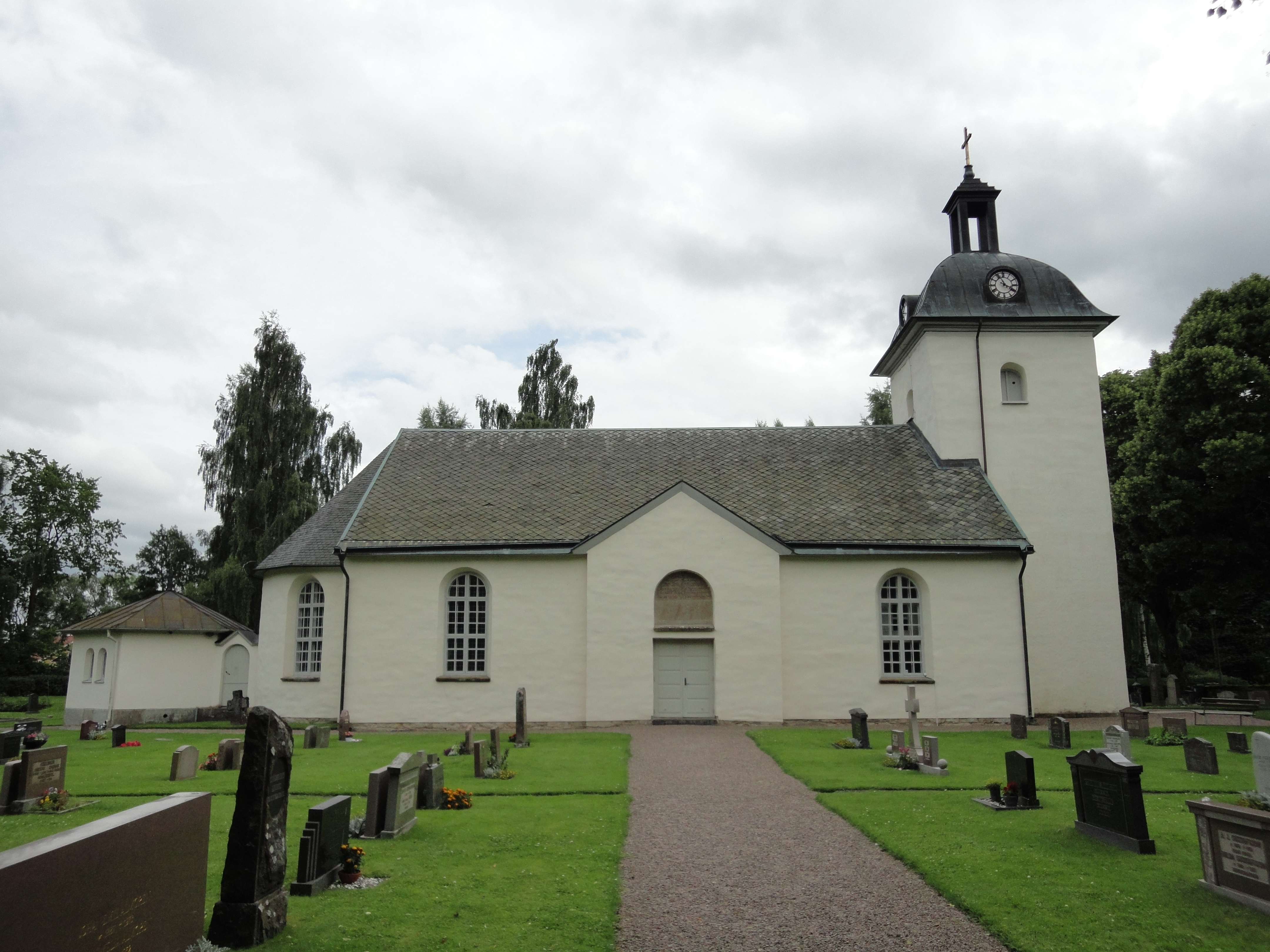 Källby kyrka, Götene kommun.